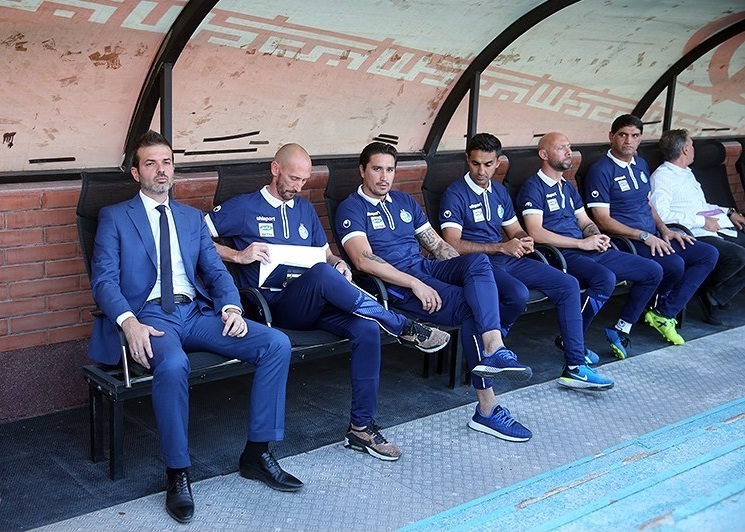 نگاره‌ای از گزارش تصویری دیدار تیم‌های استقلال و فولاد